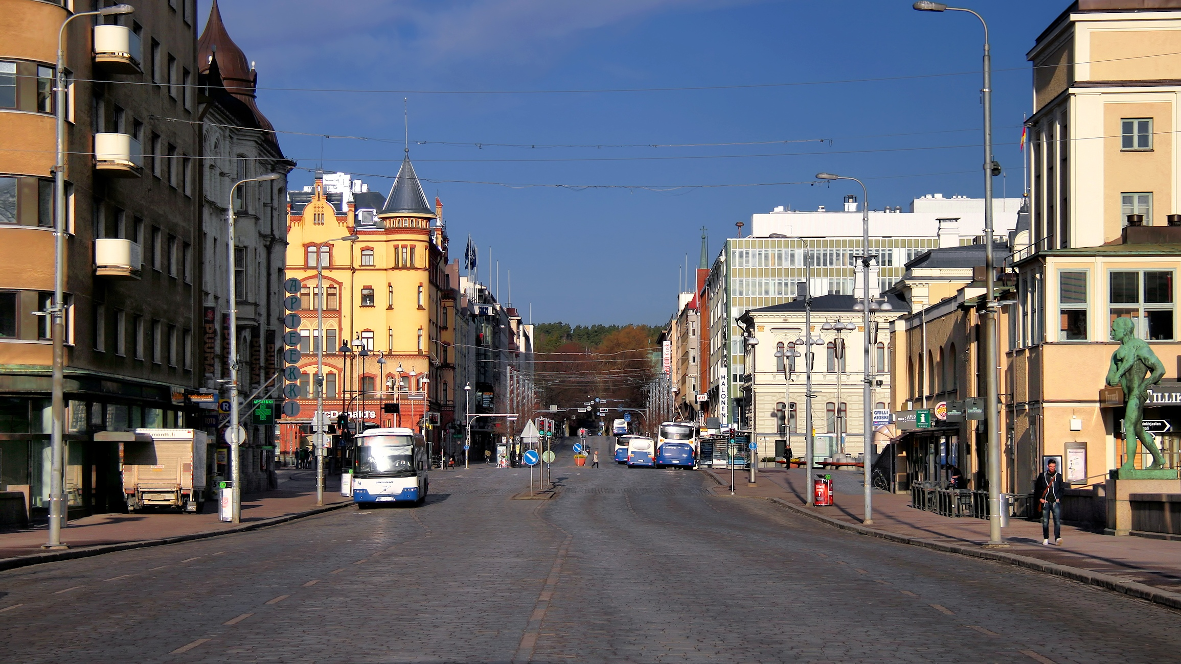 Hämeenkatu